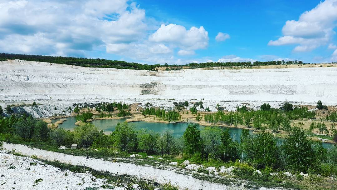 Вольский карьер относился к цементному заводу "Красный октябрь", построенному в 1900 году местным купцом М.Ф. Плигиным.